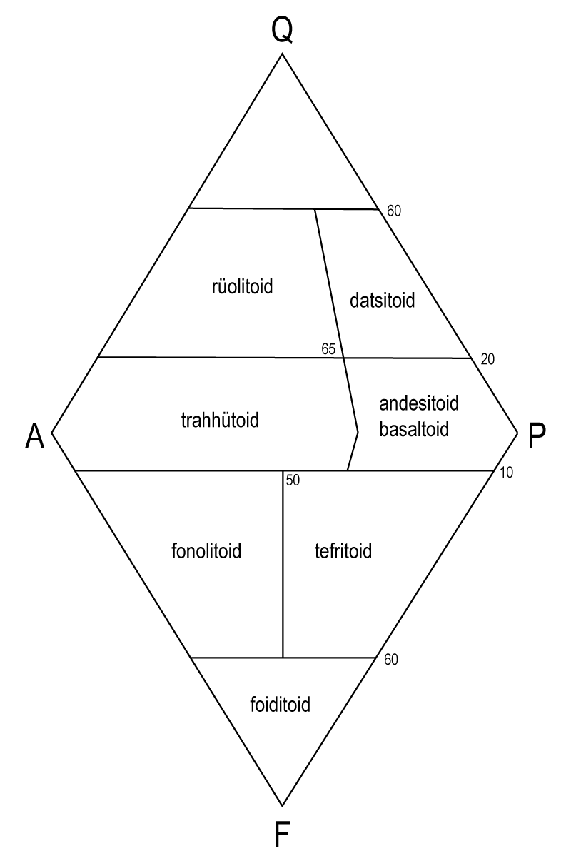 QAPF-diagramm, väliklassifikatsioon vulkaaniliste kivimite jaoks